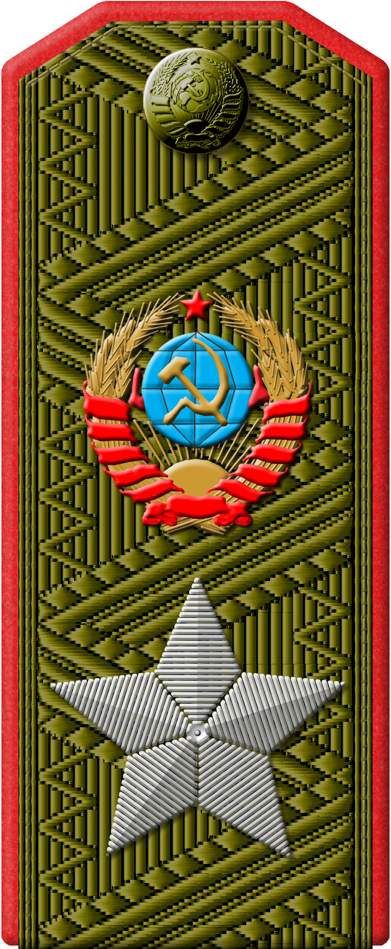 Союз Советских Социалистических Республик/Советский Союз/СССР Вооруженные силы Рабоче-Крестьянская Красная Армия (РККА) Знаки различия образца 1943г., погоны полевые. Воинское звание: Маршал Советского Союза. Первичный источник: Указ Президиума Верховного Совета СССР «О введении погон для личного состава Красной армии» от 6 января 1943г., объявленный Приказом Народного Комиссара обороны СССР № 24 от 10 января 1943 г. Приказ Народного Комиссара обороны СССР № 25 от 15 января 1943 г .«О введении новых знаков различия и об изменениях в форме одежды Красной Армии» Приказ Народного Комиссара обороны СССР № 51 от 4 февраля 1943 г.